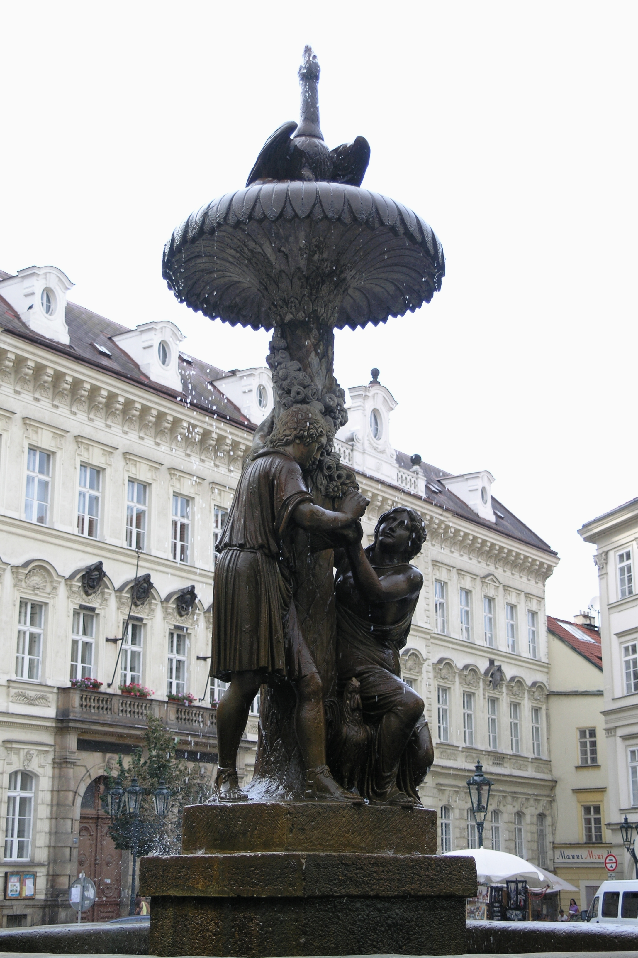 Praha, Staré Město - Wimmerova kašna